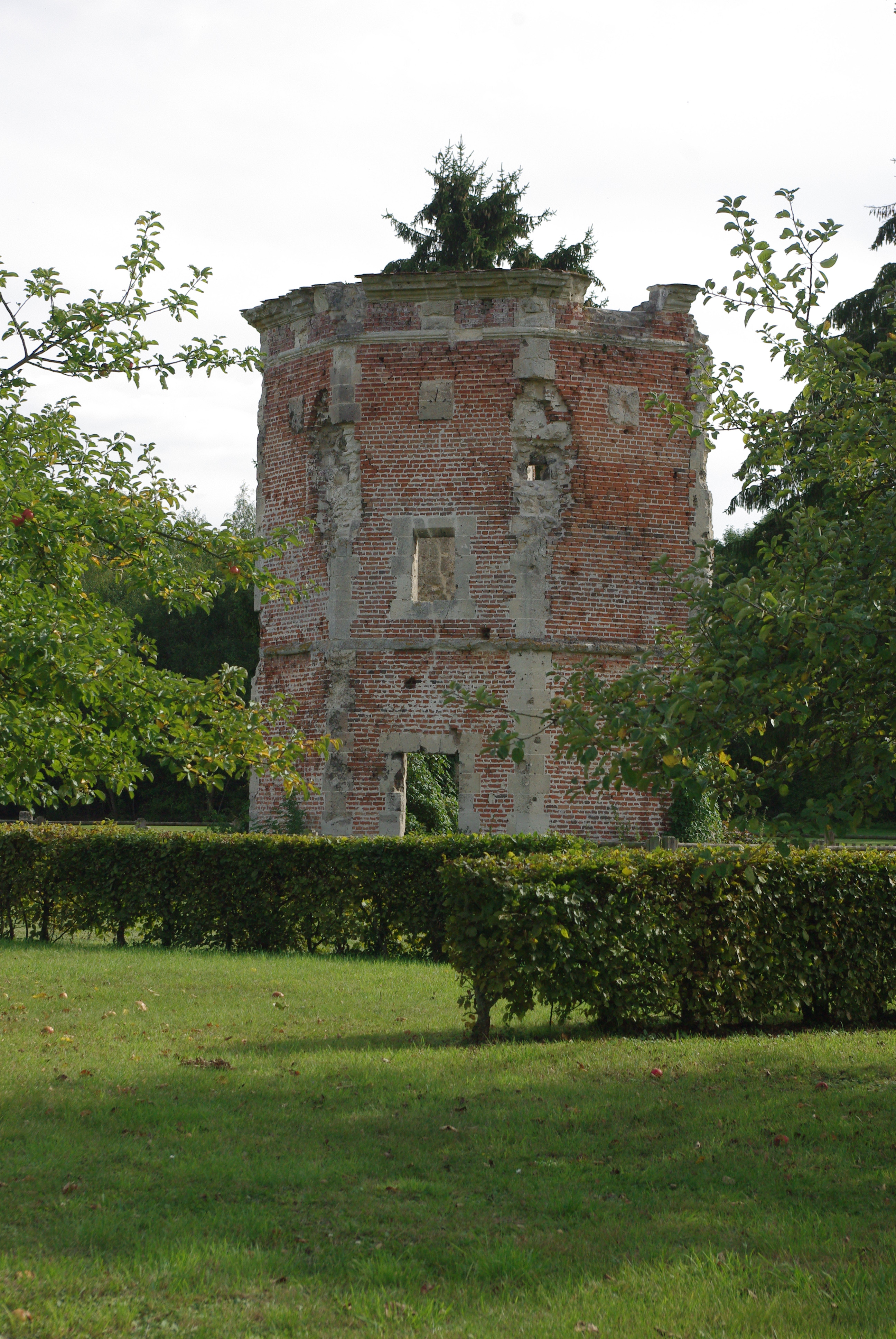 Colombier du XVIIIe siècle .